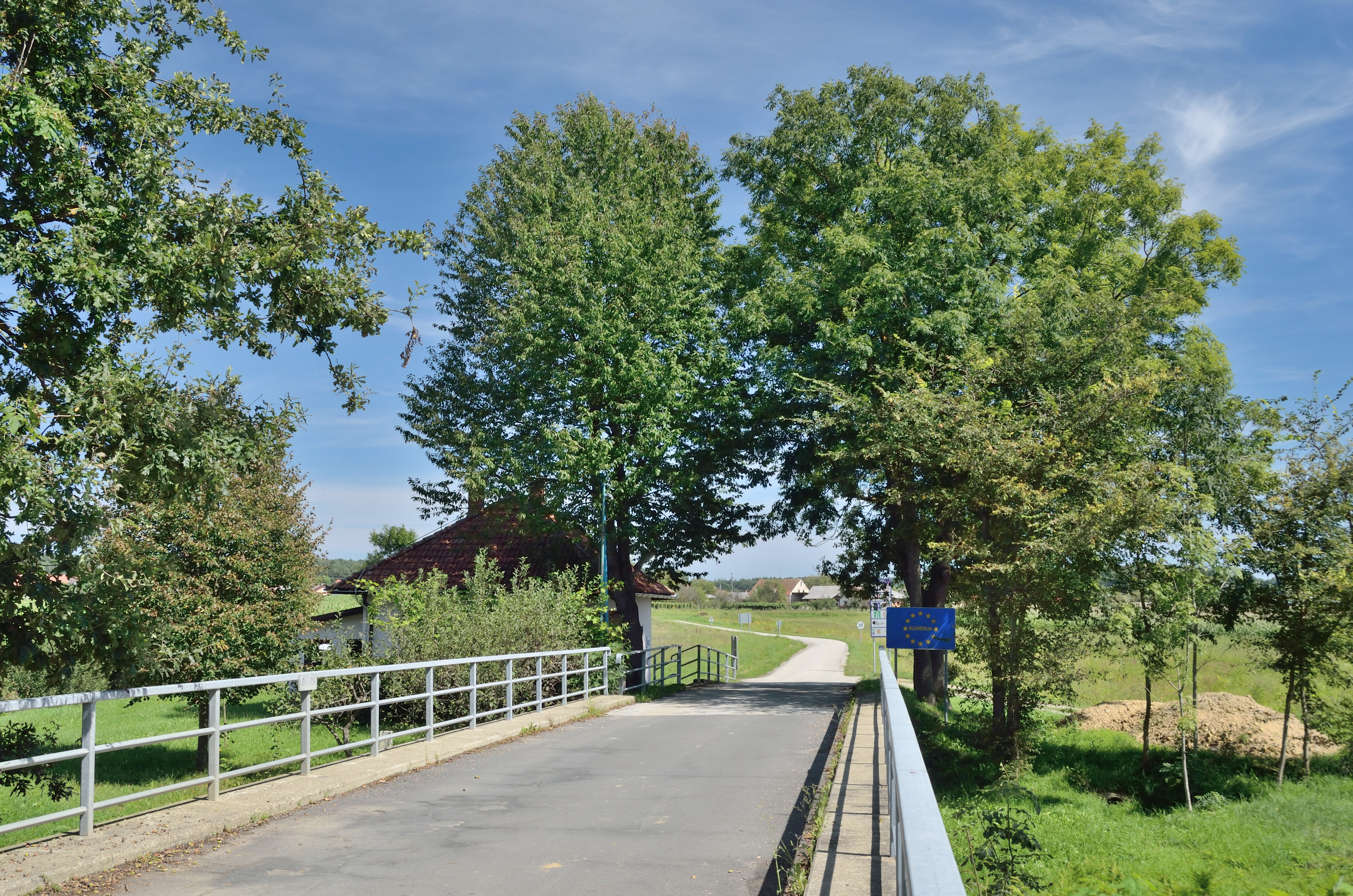 Grenzbrücke von Goritz bei Radkersburg (Steiermark) nach Korovci (Slovenien) über die Kutschenitza / Kučnica.